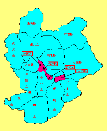 中文（中国大陆）: 此图片由王云峰wangyunfeng原创，用于WIKI。